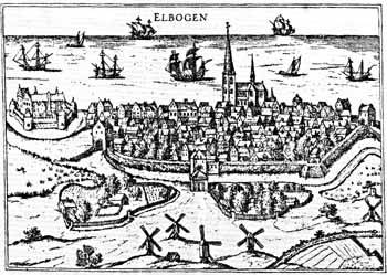 Malmø i Slutningen af det 16de Aarhundrede